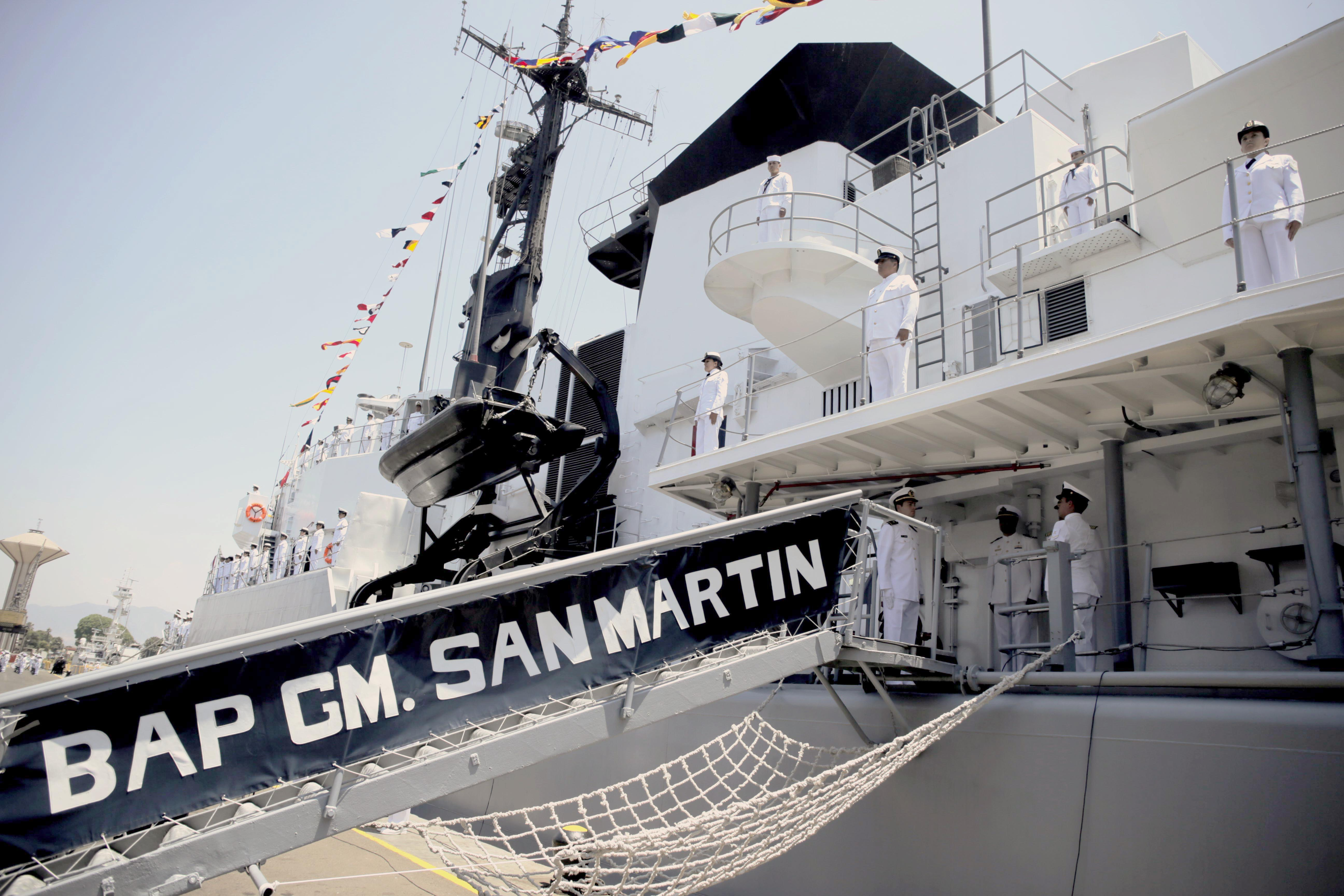 El Presidente de la República, Ollanta Humala Tasso y el ministro de Defensa, Pedro Cateriano Bellido participaron en la transferencia de la Fragata Misilera BAP Carvajal desde la Comandancia General de Operaciones del Pacífico a la Dirección de Capitanías y Guardacostas (DICAPI) como nueva patrullera oceánica, con el nombre de BAP Guardamarina San Martín.